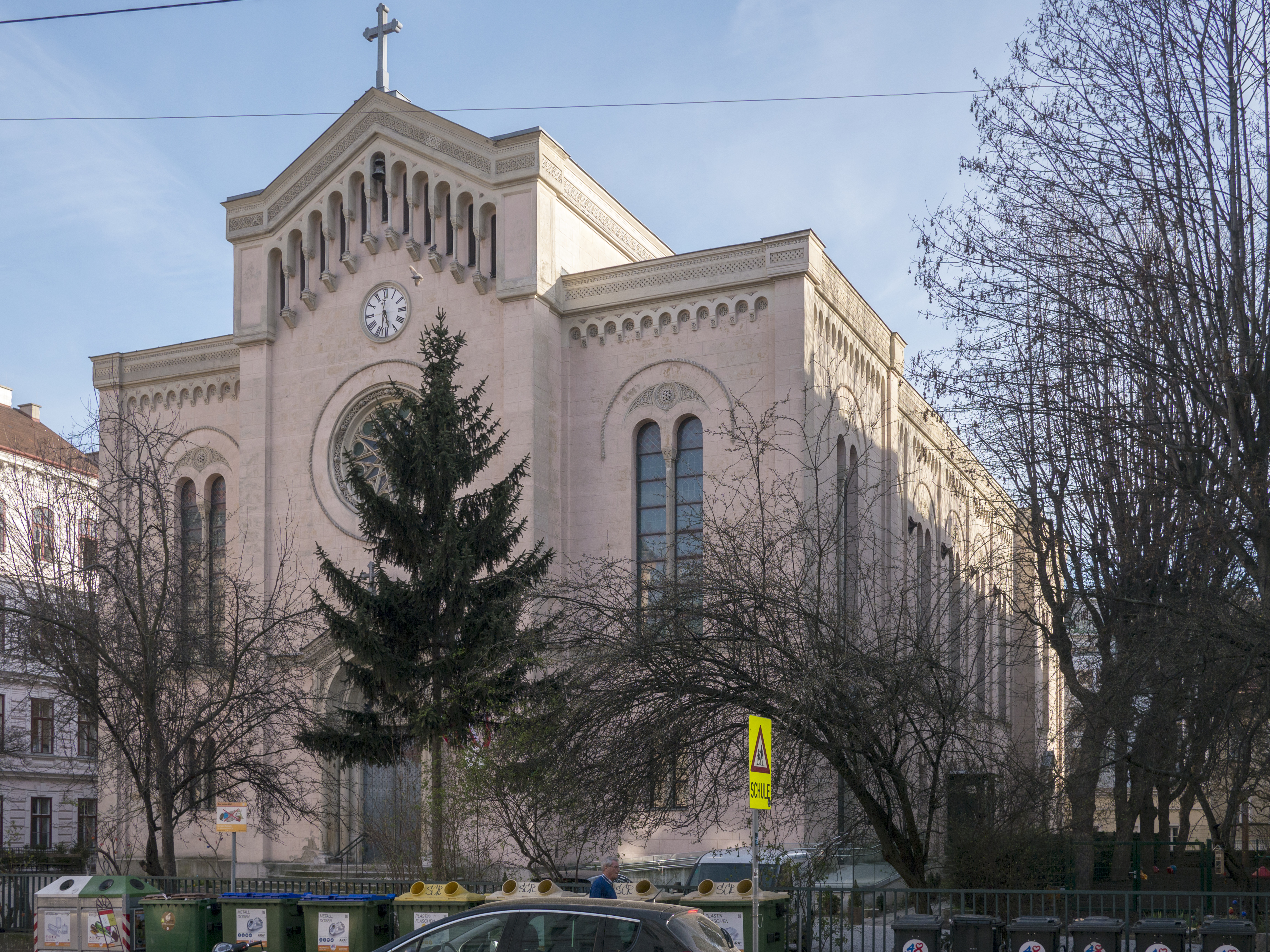 Gustavus Adolphus Church, Vienna